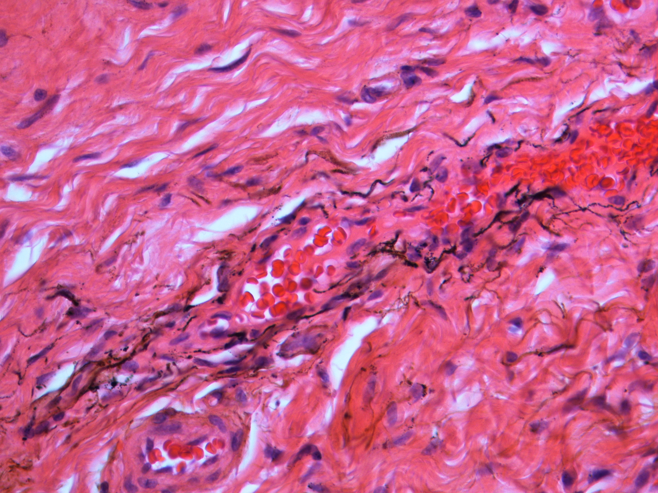 Amalgamtätowierung mit Ablagerungen von feingranulärem Silbersulfid in Umgebung kleiner Gefäße der Mundschleimhaut